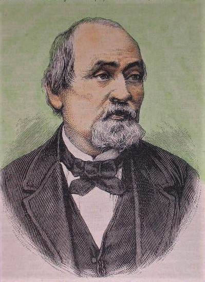 Hermann Schulze-Delitzsch 1879, teilkolorierter Holzstich, ca. 10 x 7,5 cm